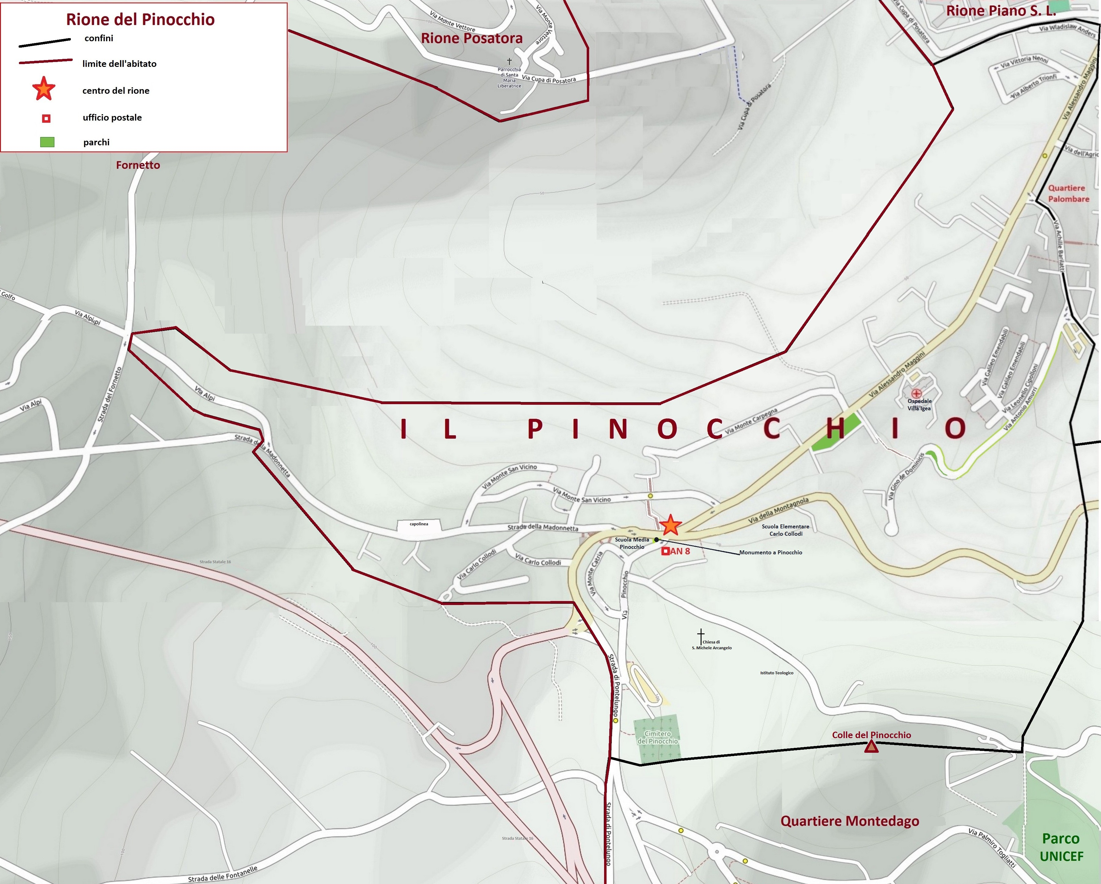 Mappa del Rione Pinocchio di Ancona, con i confini, le vie, le piazze e i parchi.